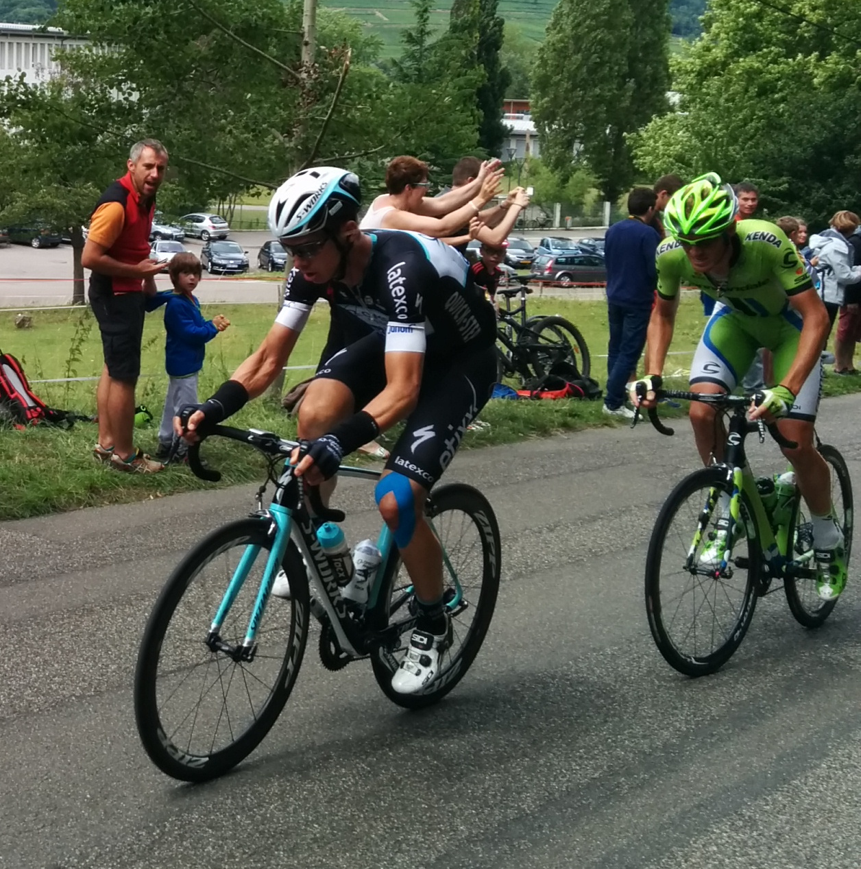 Tony Martin und Alessandro De Marchi. Einstieg zum Cinq Châteux auf der 9. Etappe der Tour de France 2014